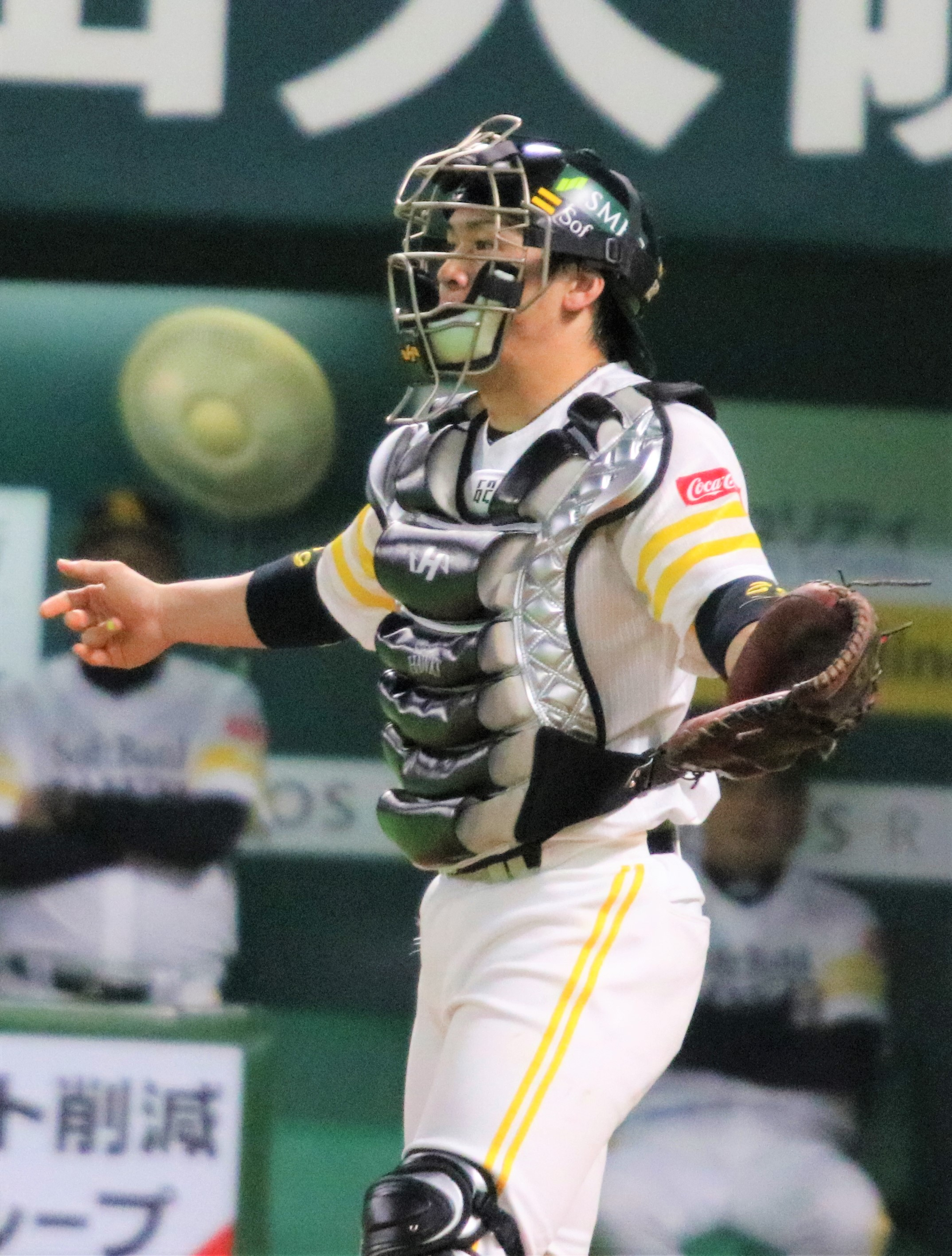 2017/11/4 日本シリーズ第6戦